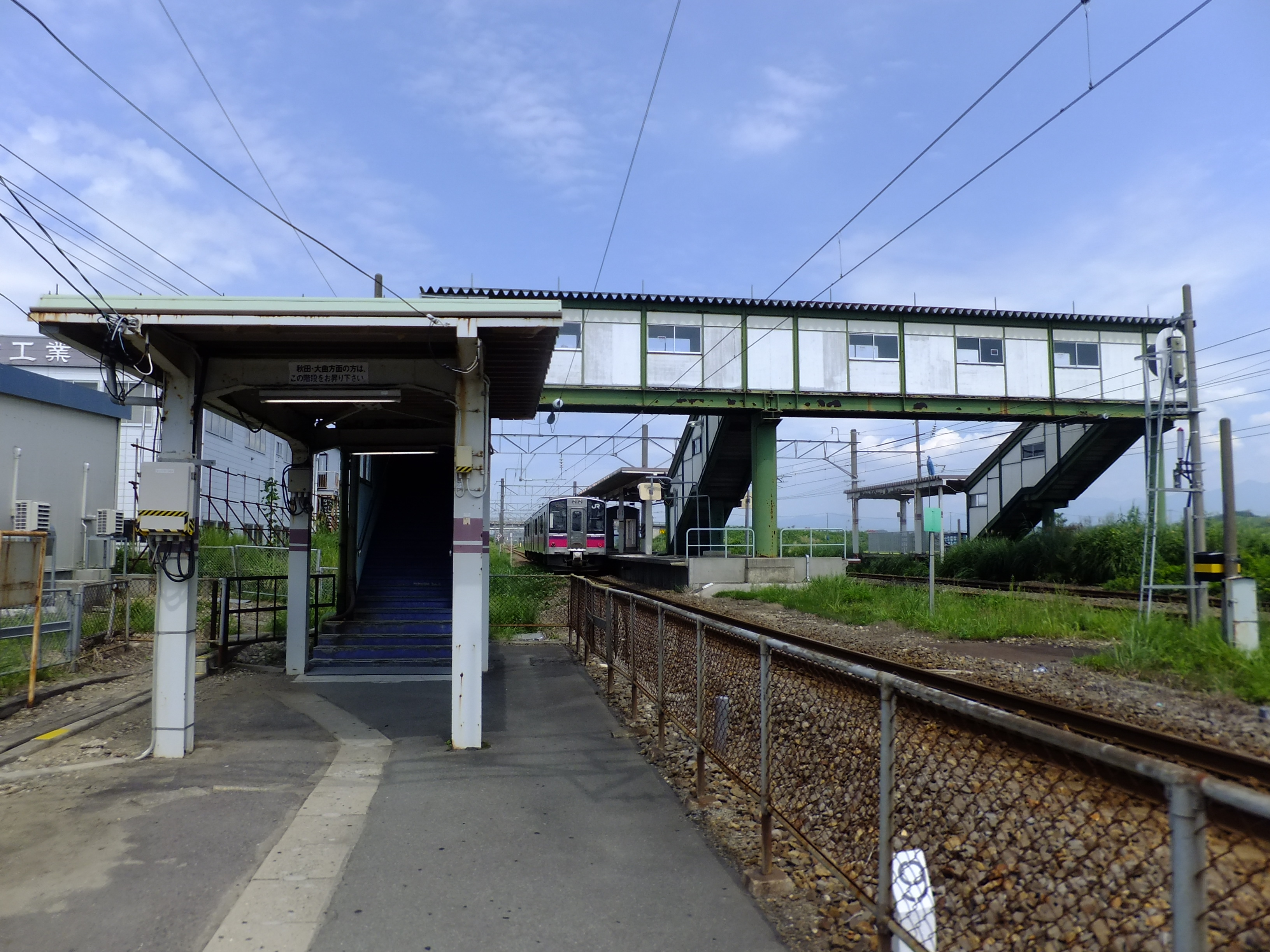 奥羽本線四ツ小屋駅（秋田県秋田市）